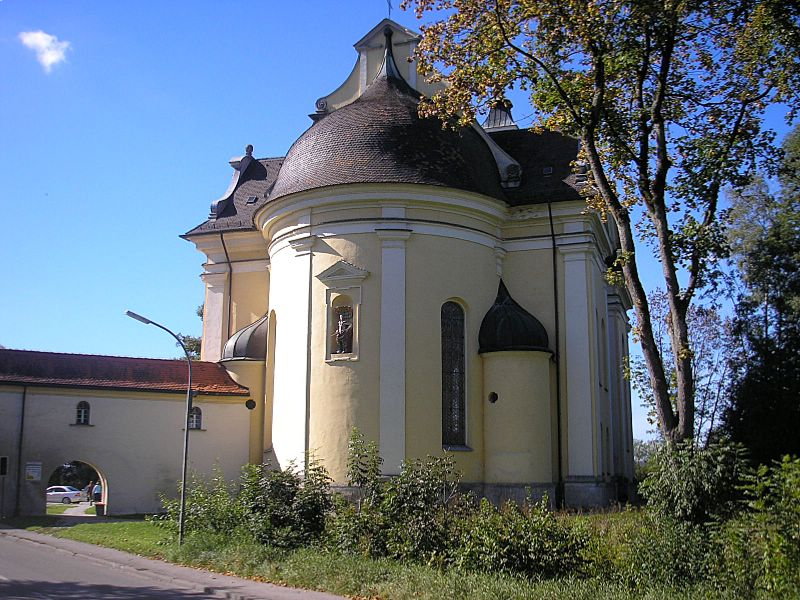 Wallfahrtskirche St. Rasso (Grafrath, Landkreis Fürstenfeldbruck, Oberbayern). Choransicht. Eigene Aufnahme, Okt. 2006 / Pilgrimage church St. Rasso near Grafrath (Upper Bavaria, Germany). The choir. Own photo, Oct. 2006